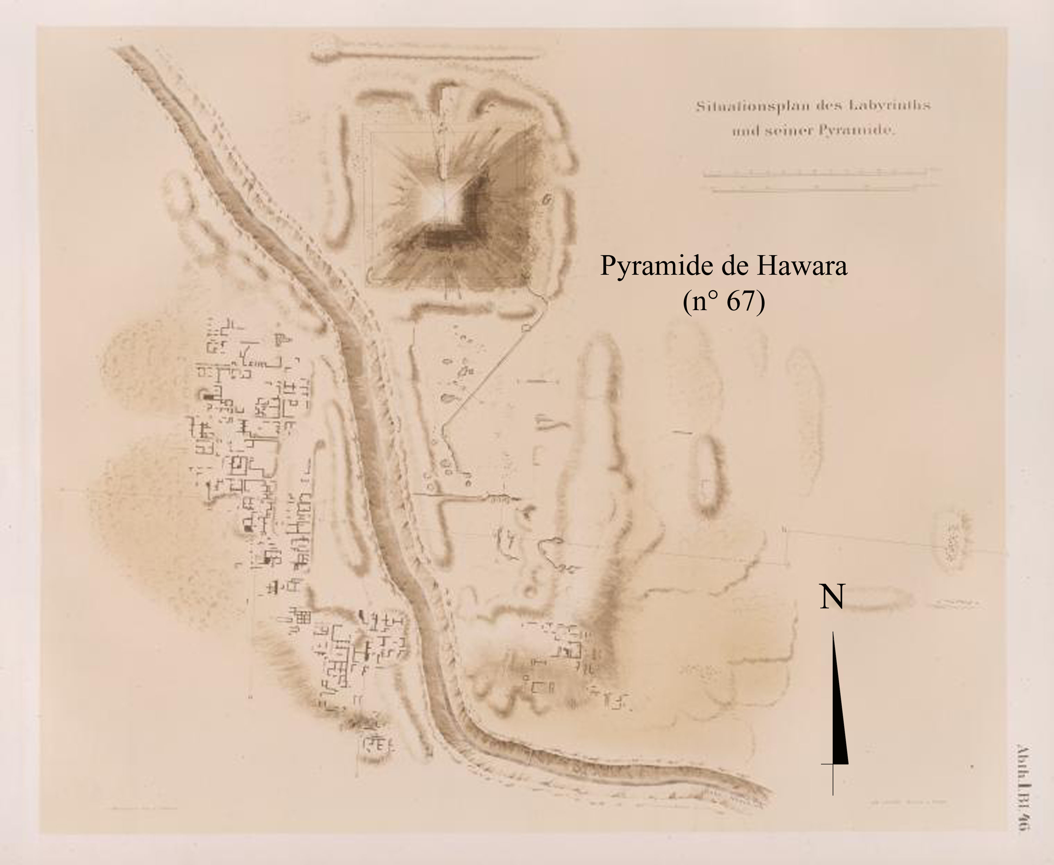 Carte de Hawara(Karl Richard Lepsius)